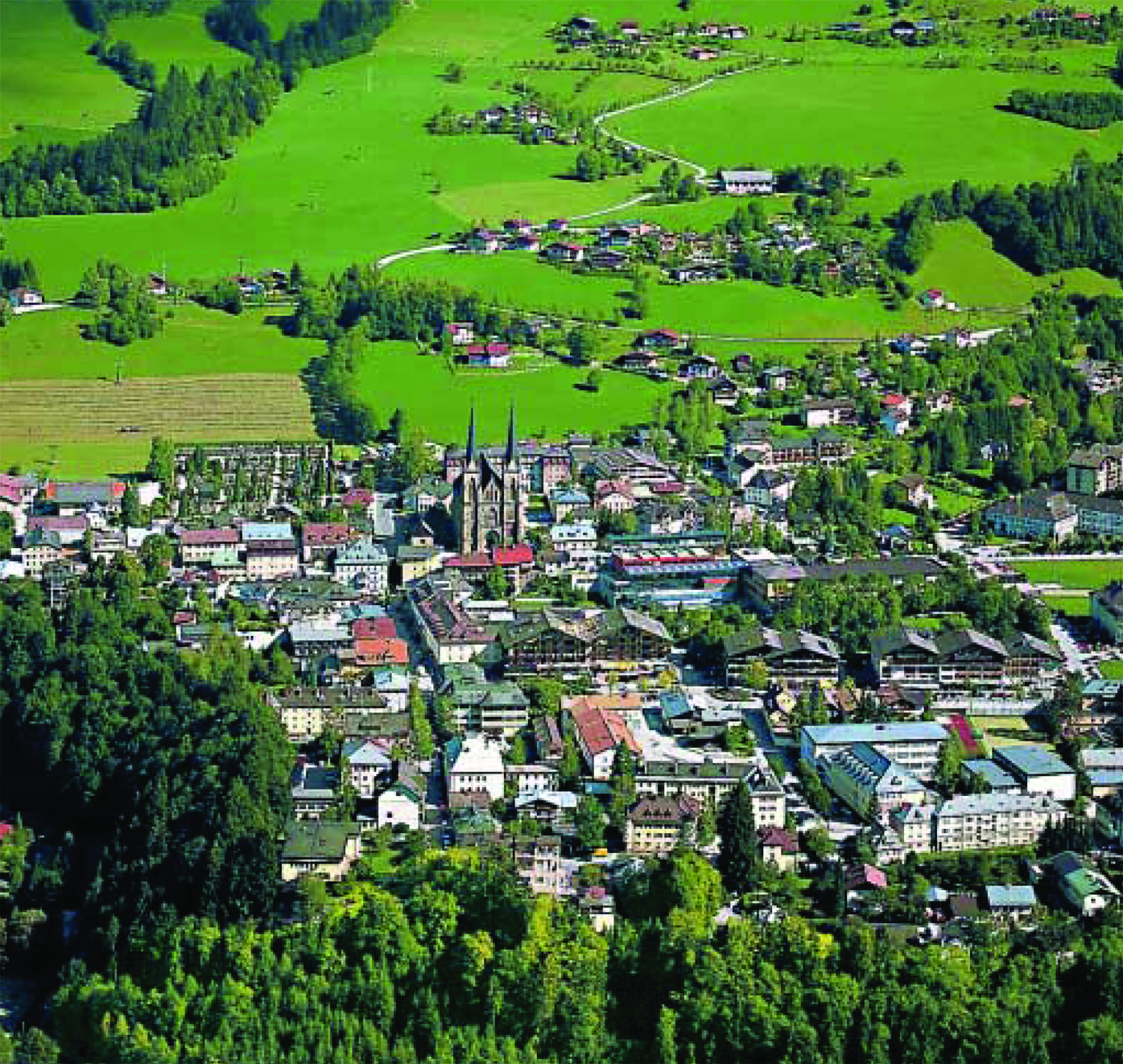 Ansicht von St. Johann